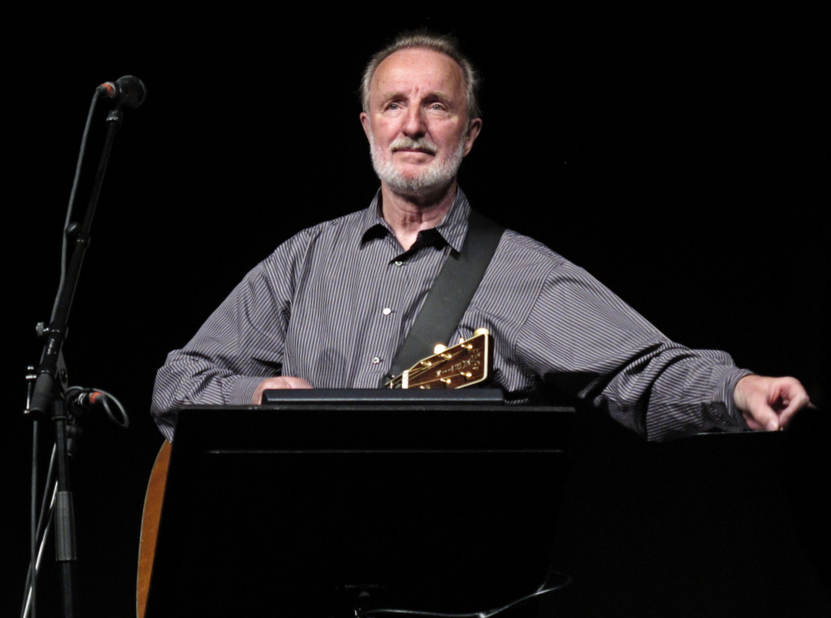 Hannes Wader, Liedermacher, Augsburg, Konzertauftritt 2010-04